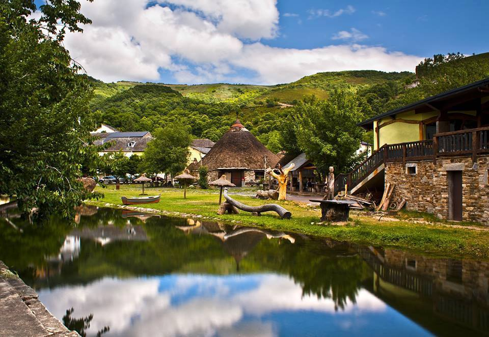 El río Balboa a su paso por el municipio